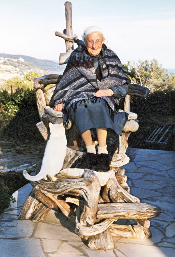 Alors que Soeur Emmanuelle essayait le Trône du Roi de la Forêt, un chat blanc, très sauvage habituellement, a voulu monter sur ses genoux.